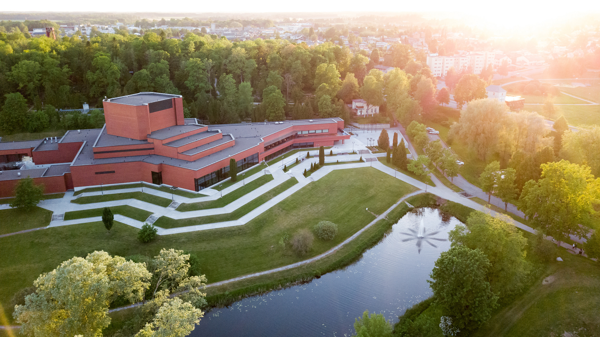 Ugala teatrimaja, 2018